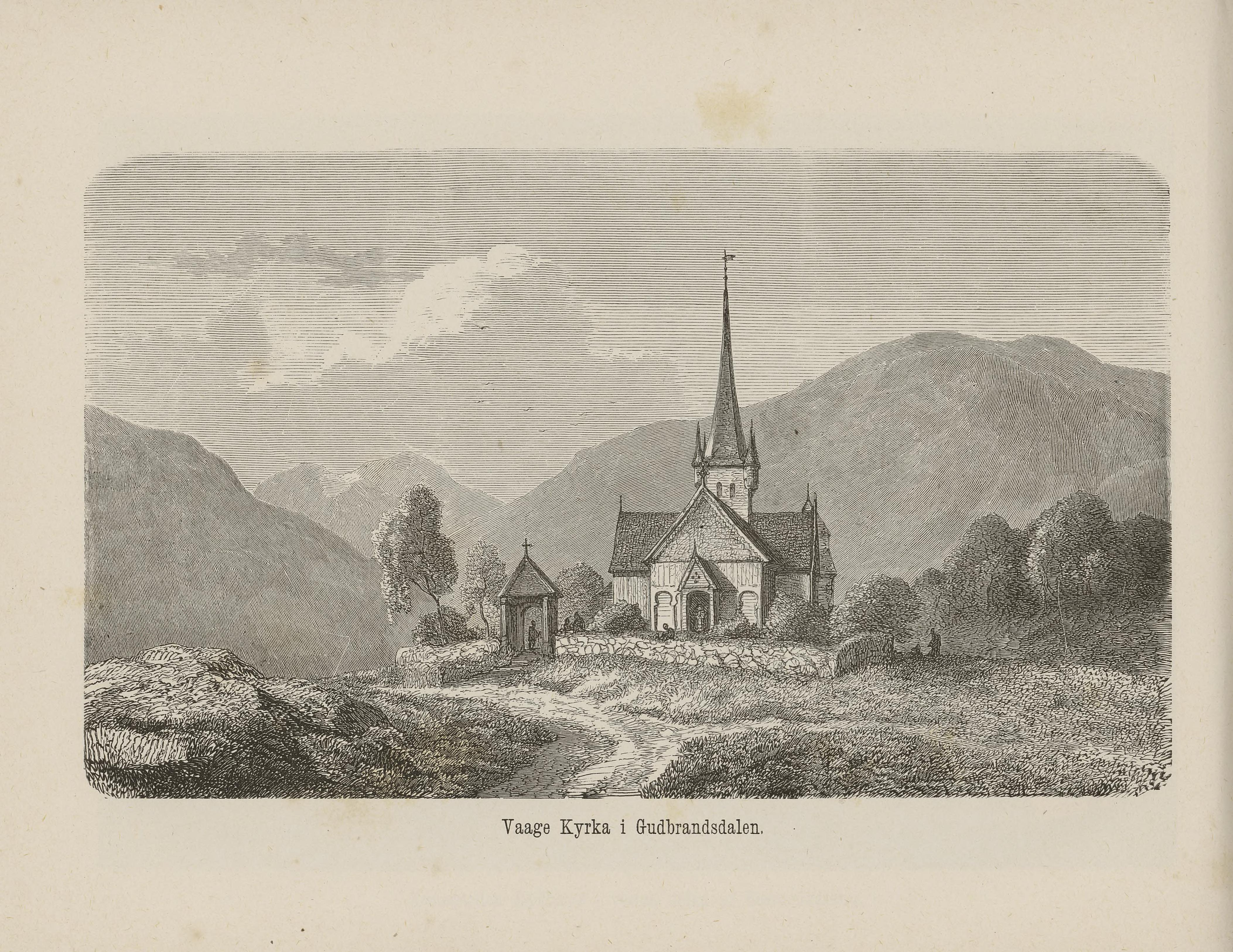 Illustrasjon hentet fra boken Nordiska taflor av ukjent forfatter og utgitt av Albert Bonnier (se, 1865)